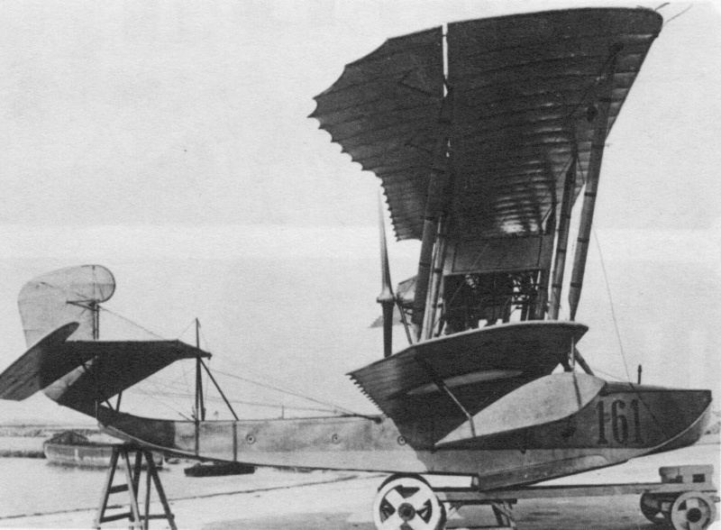 Grigorovič M-9